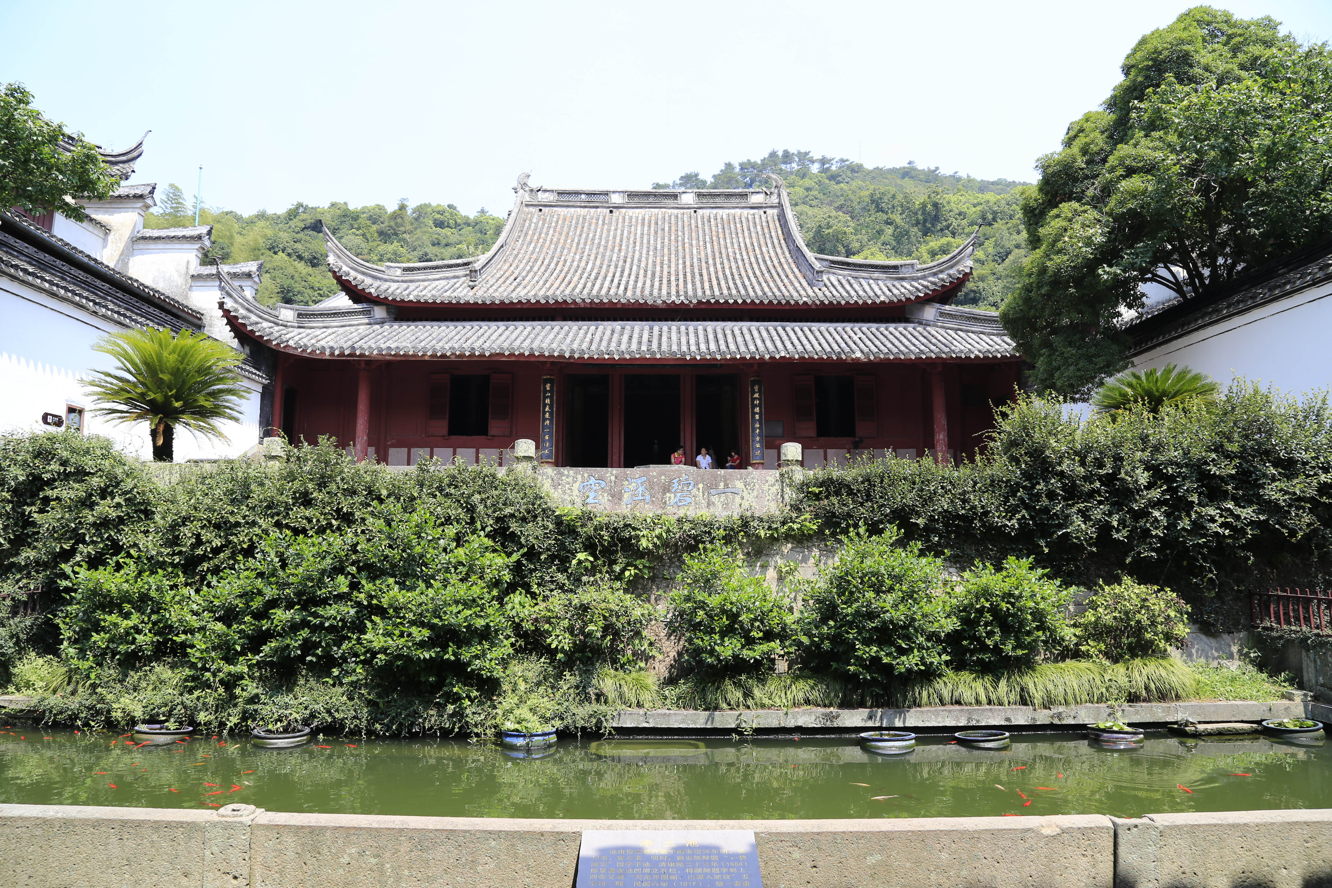 宁波市保国寺 —— 大殿